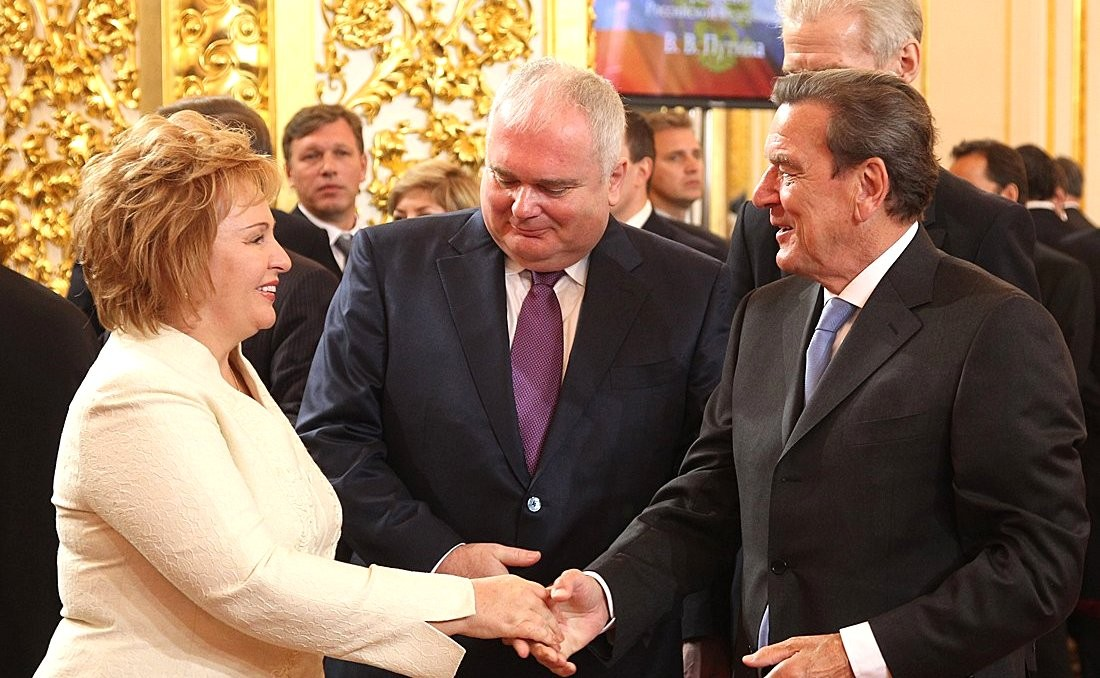 En la ceremonia de inauguración de Vladímir Putin como Presidente de Rusia, Lyudmila Putina y Gerhard Schröder.